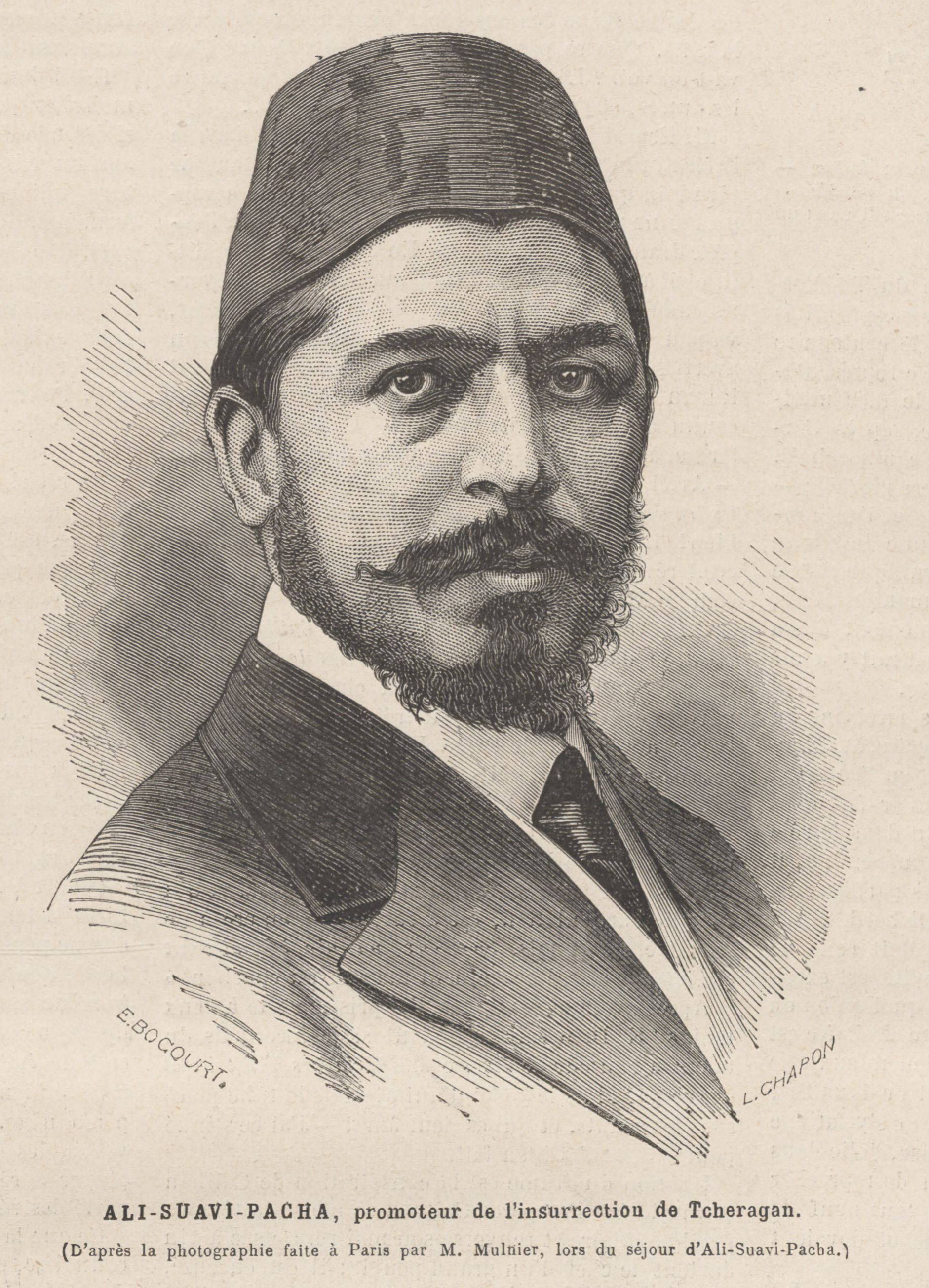 Ali Suavi, 2. Abdülhamid'i devirmek isteyen erken dönem Osmanlı aydınlarından.